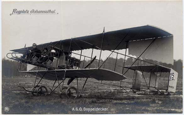 Ago Aufklärer, noch mit offenem Cokpit